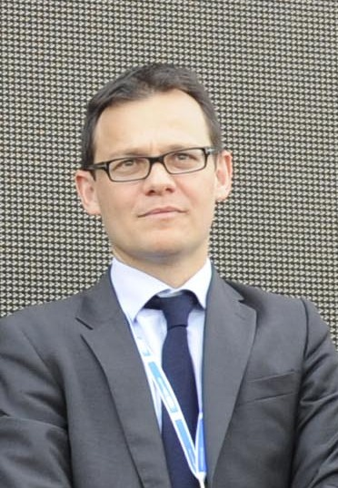 Stéphane Israël au Salon du Bourget 2013